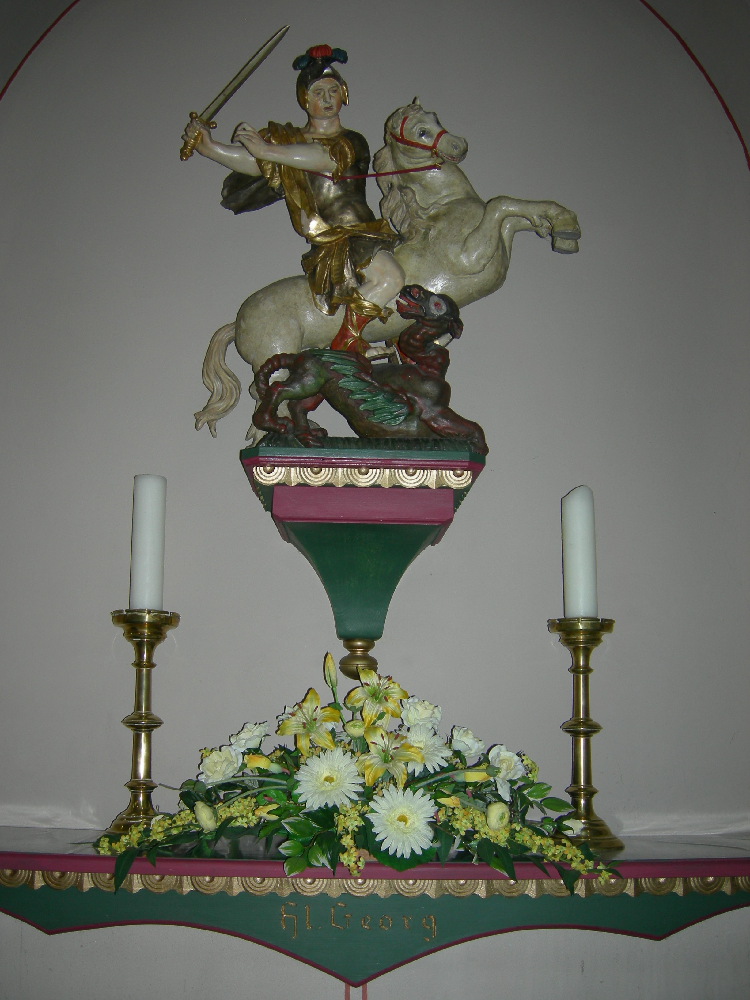 St. Georg - Kirchenpatron (St. Georg, Pfaffenwiesbach, 2014)